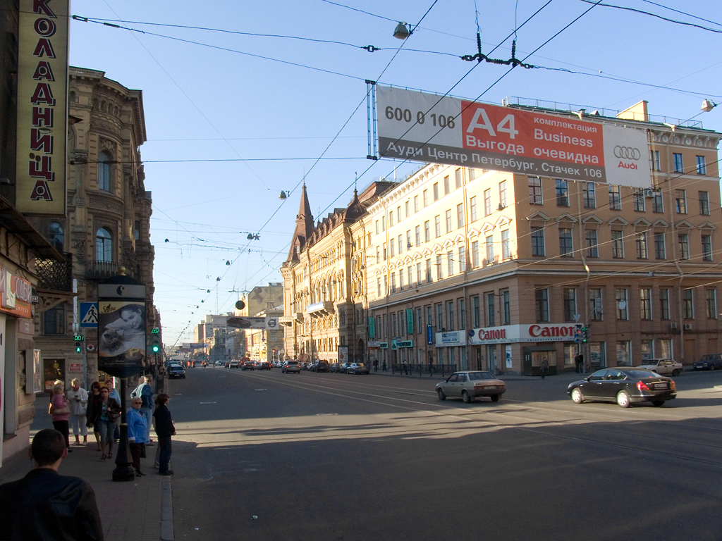 перекрёсток Литейного проспекта и улицы Пестеля (вид в сторону Невы)